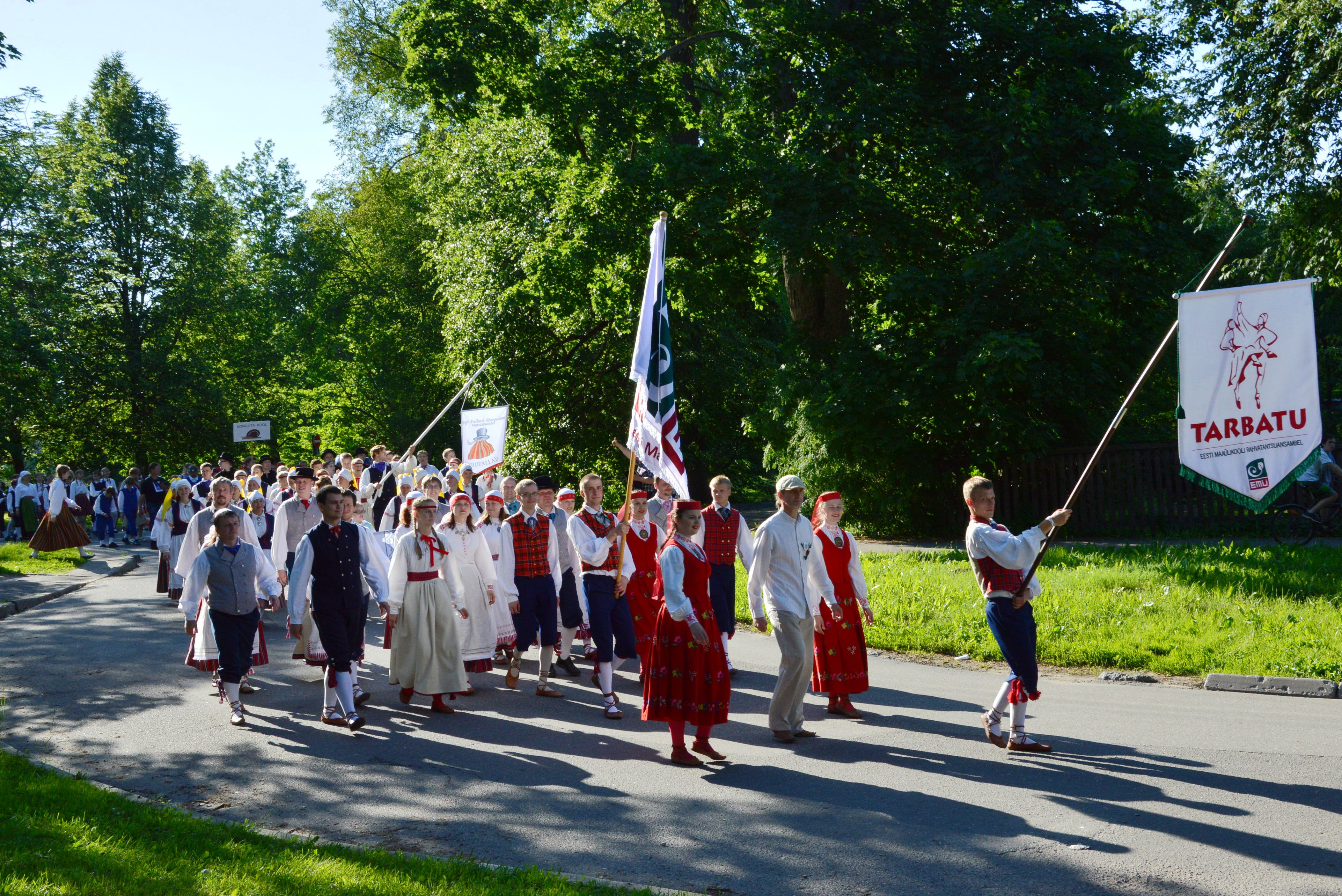 Tarbatu Tartu laulupeo rongkäigus.